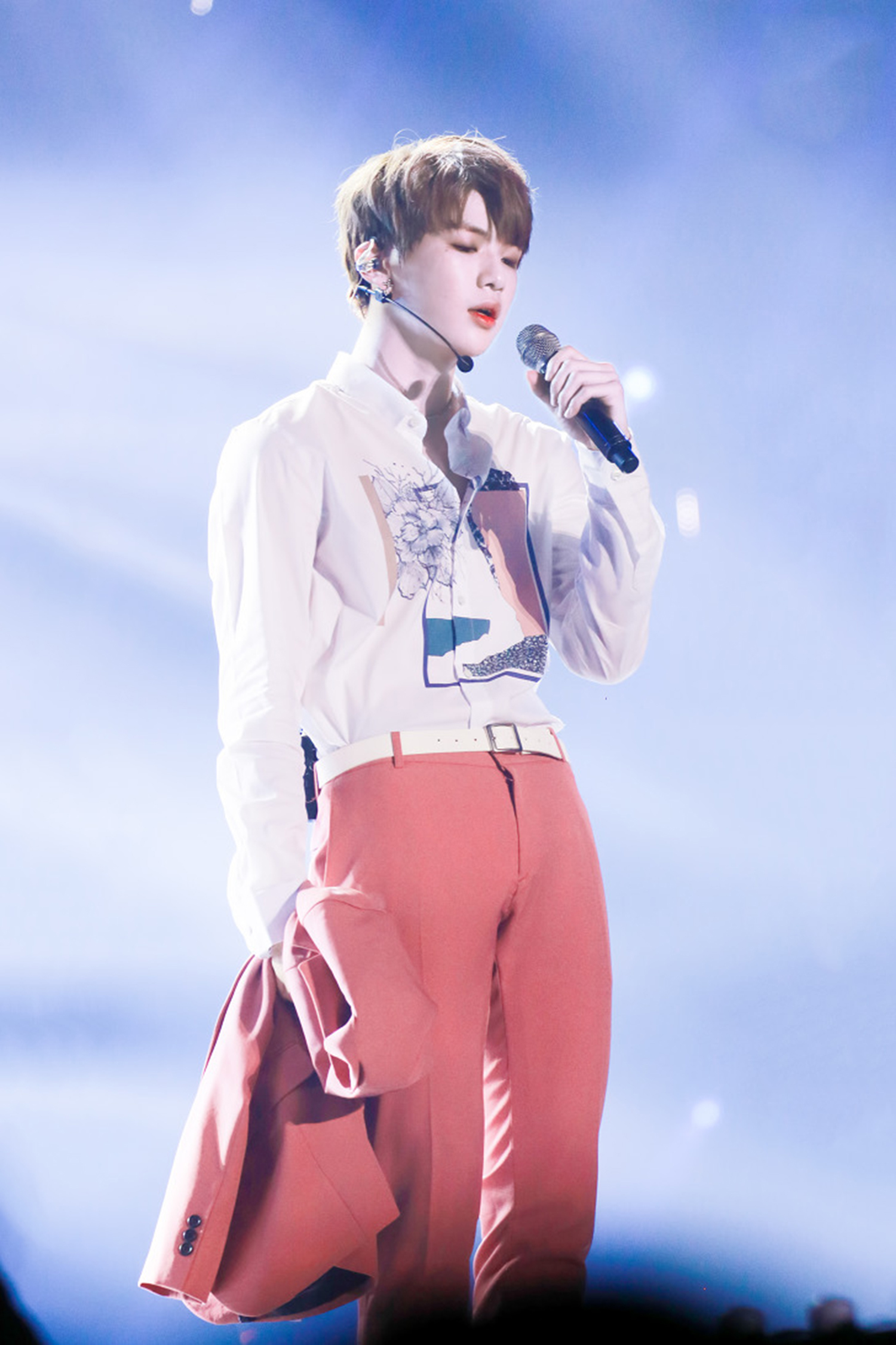 Kang Daniel during the Wanna One Premiere Show Concert on August 7, 2017.